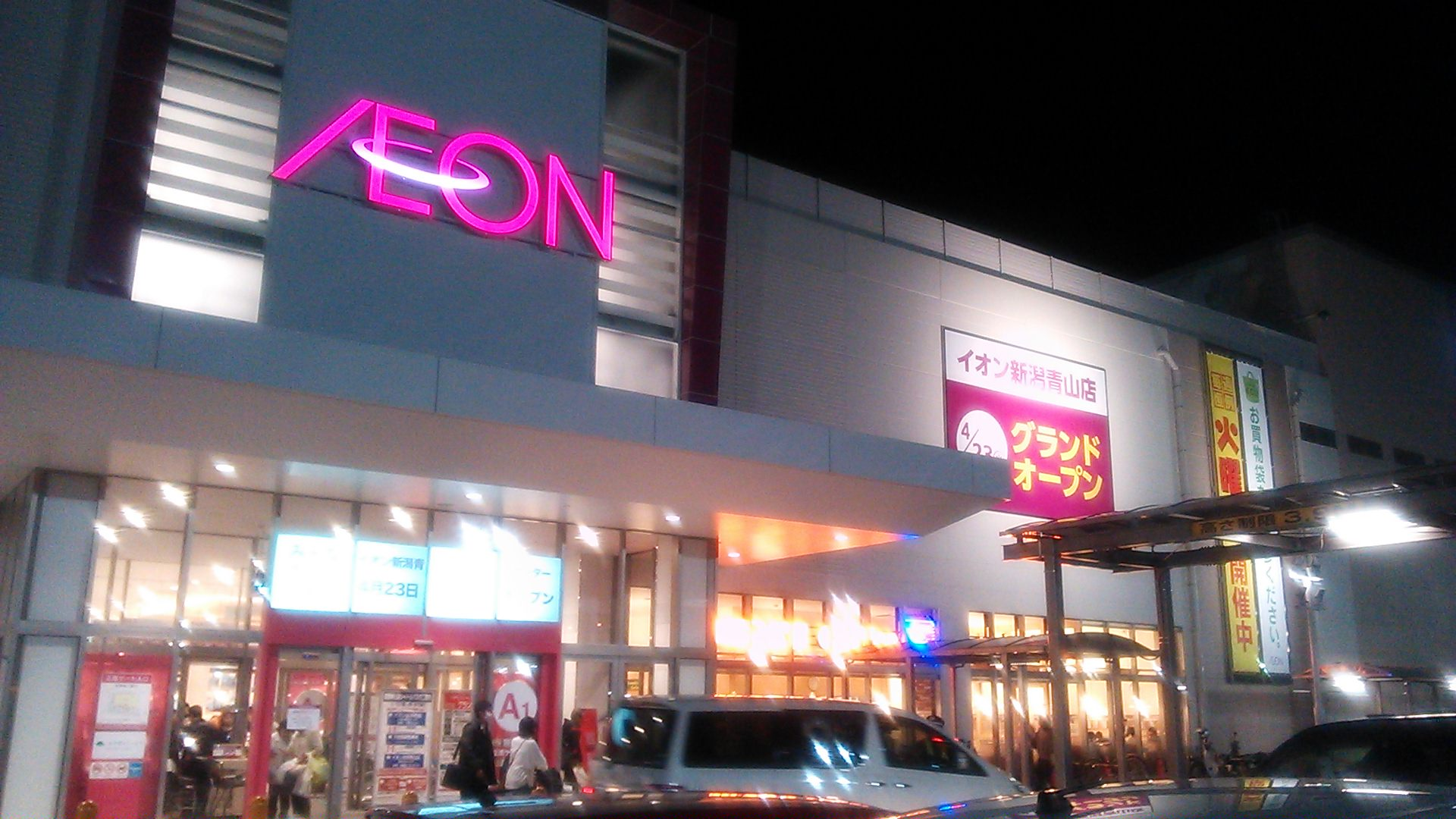 イオン新潟青山ショッピングセンター ( 正面ゲート付近 )